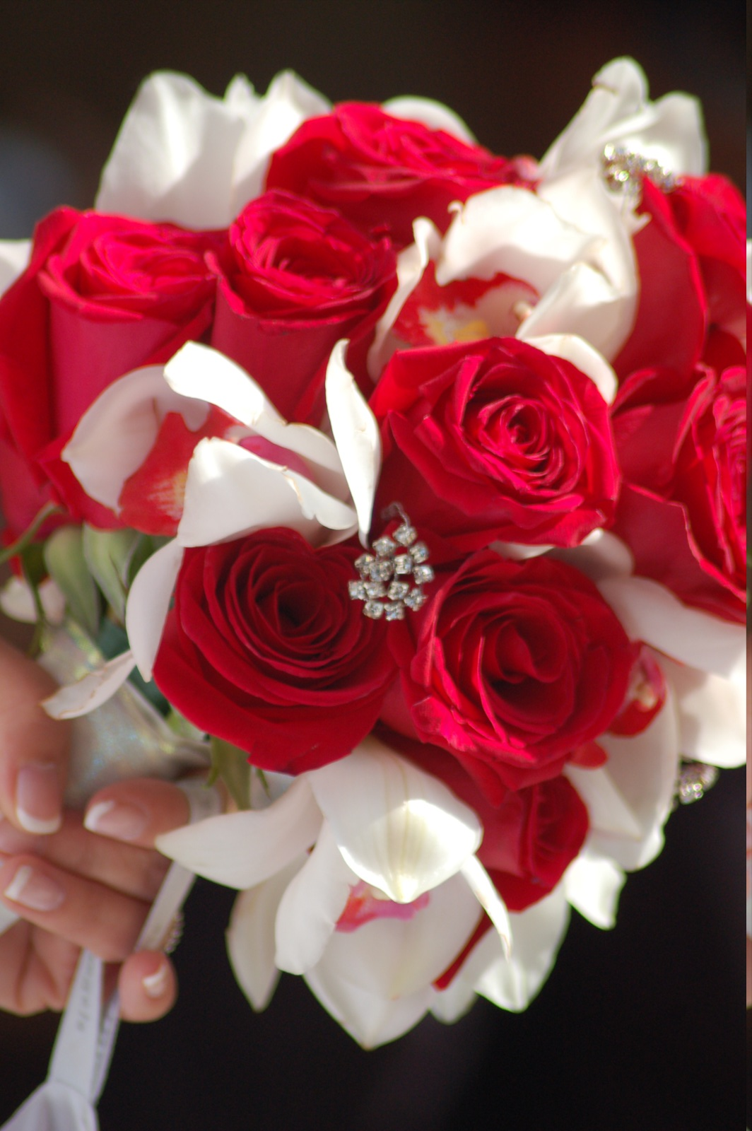 花束(ブーケ)。リボン、アクセサリー、赤バラに白を添える等、花瓶に差すまでの一時の包装手段でしかない「花束」以上に、芸術品としての色合いが強い.